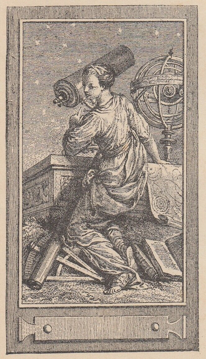 Allegoria - Astronomia - 1890 xilografia